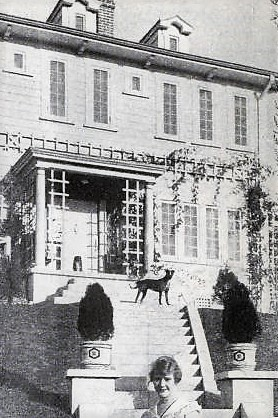 Mary MacLaren davanti alla sua casa di Hollywood